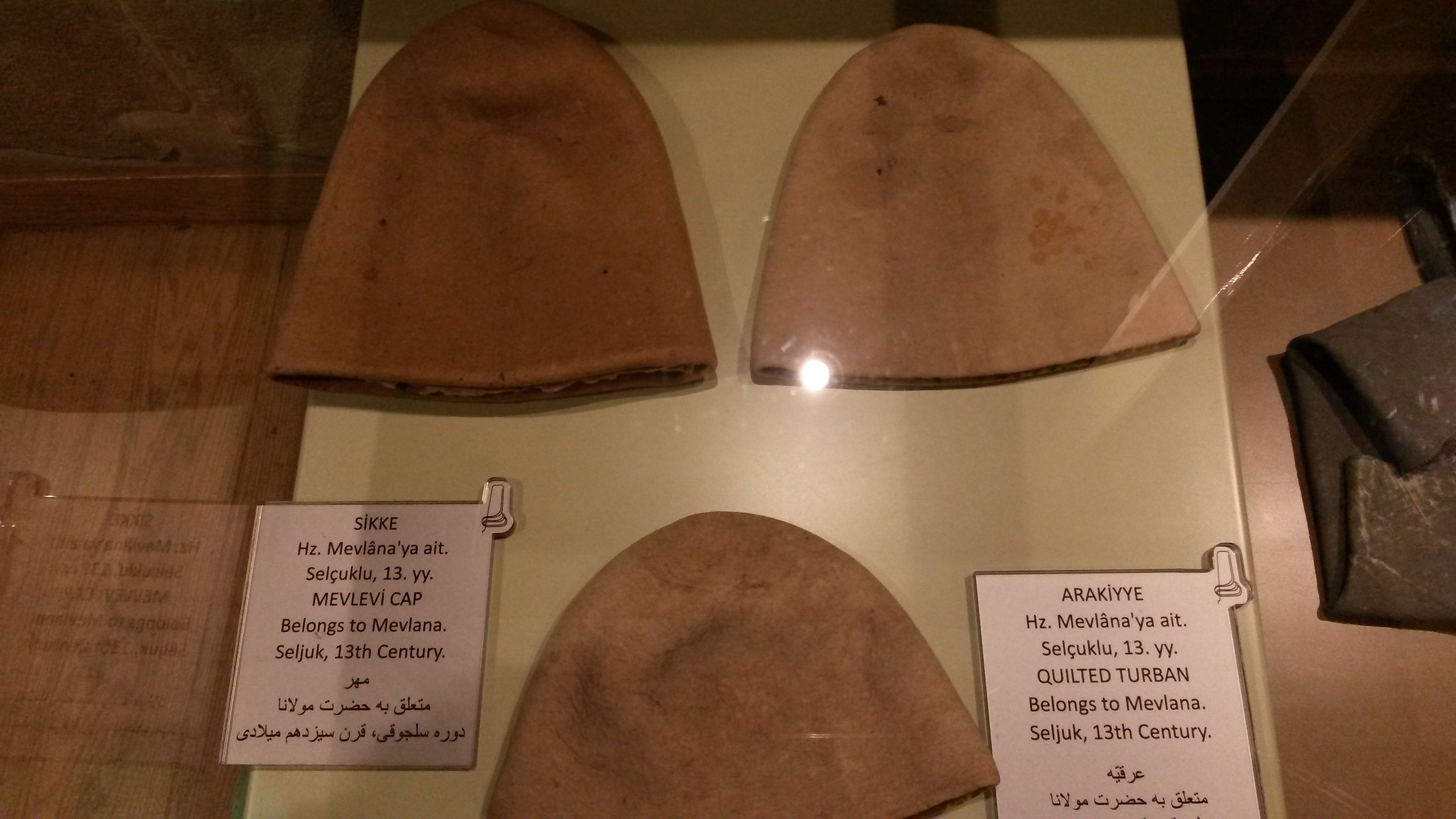 Sikke. Hz. Mevlana'ya ait. Selçuklu, 13.yy. Arakiyye. Hz. Mevlana'ya ait. Selçuklu, 13.yy.